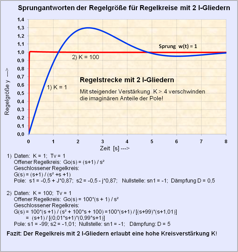 Sprungantwort einer instabilen Regelstrecke mit 2 I-Gliedern